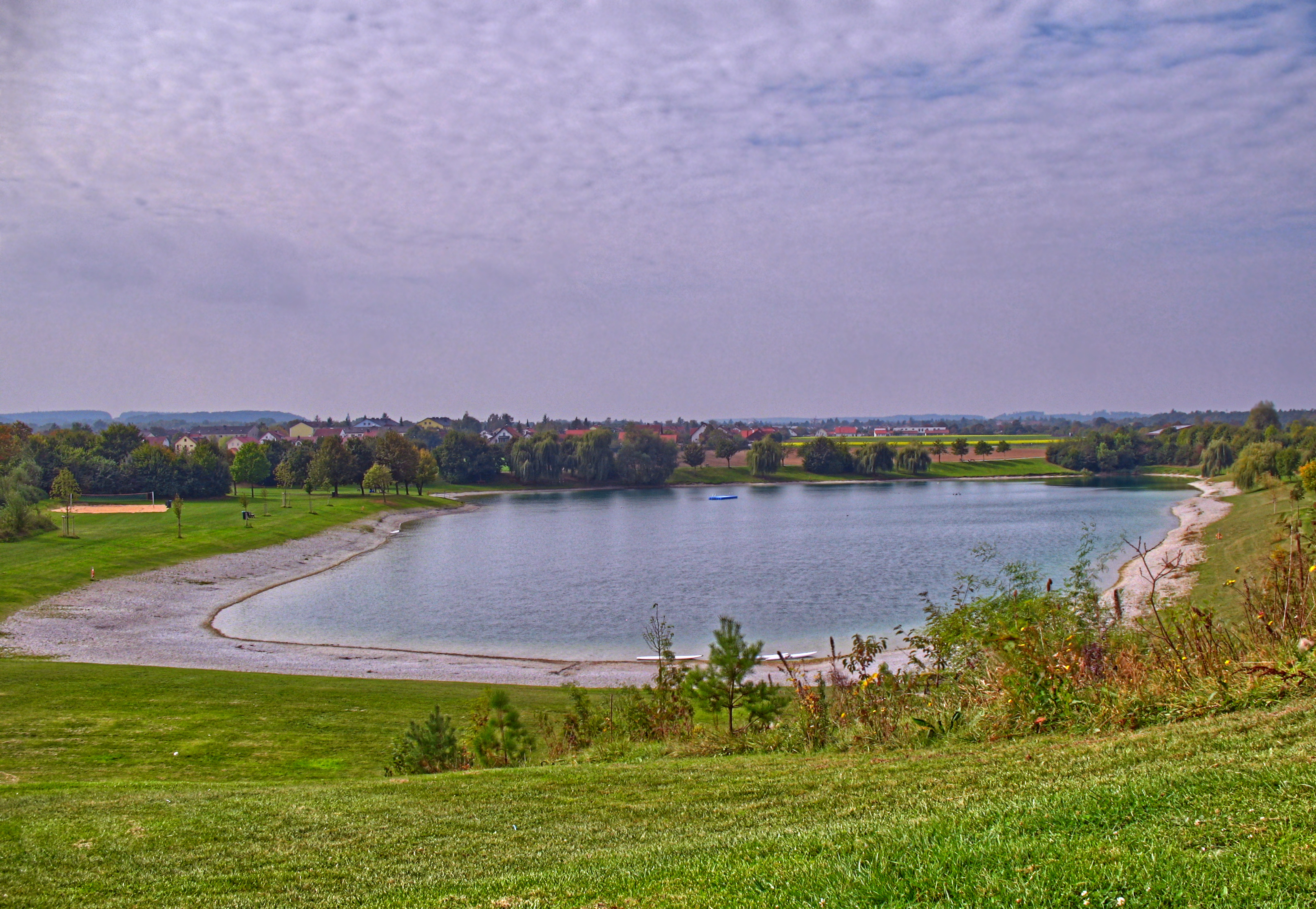 Deutschland, Bayern, Fürstenfeldbruck, Emmeringer See, Gesamtansicht HDR